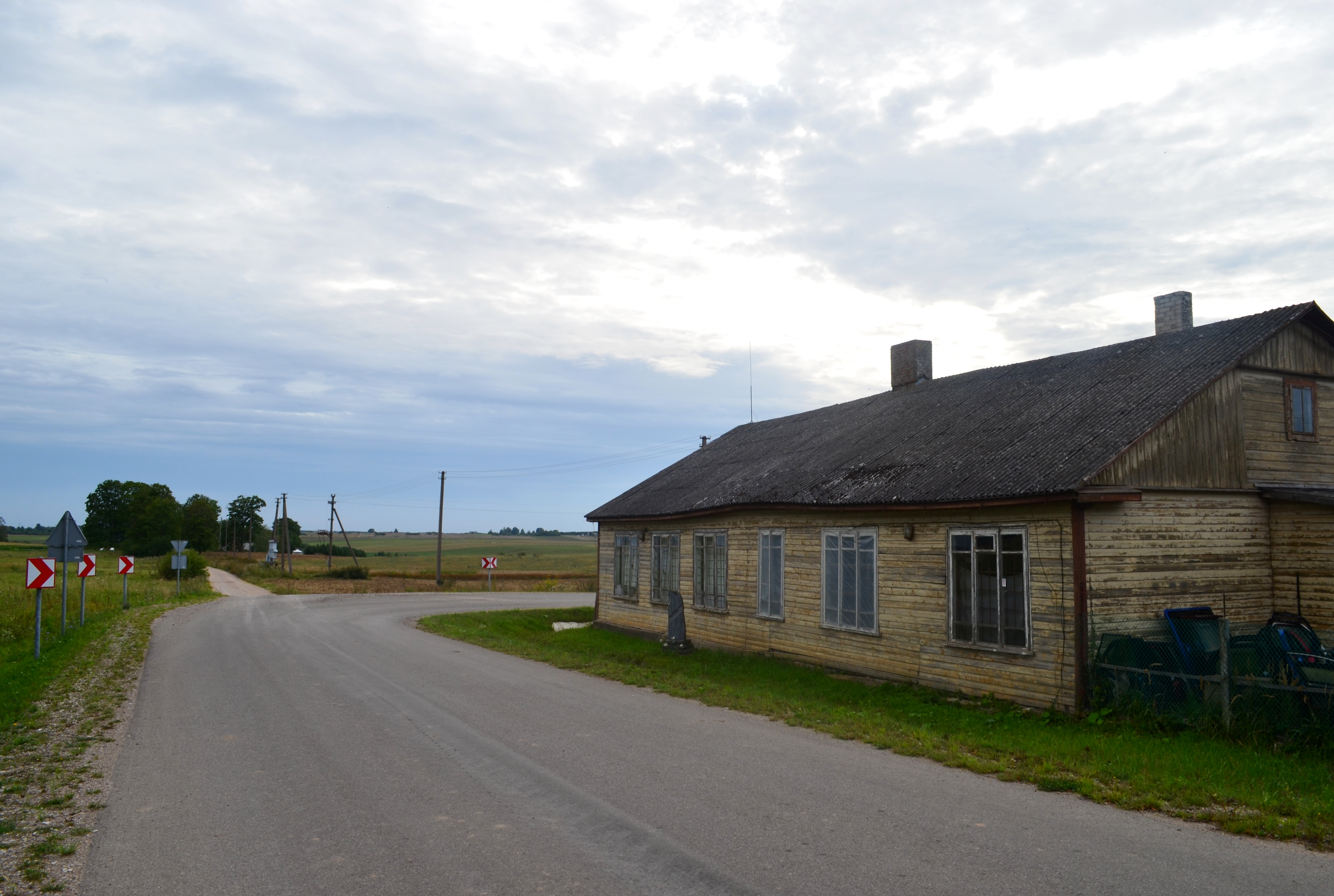 Dubėnai, Alytaus raj.